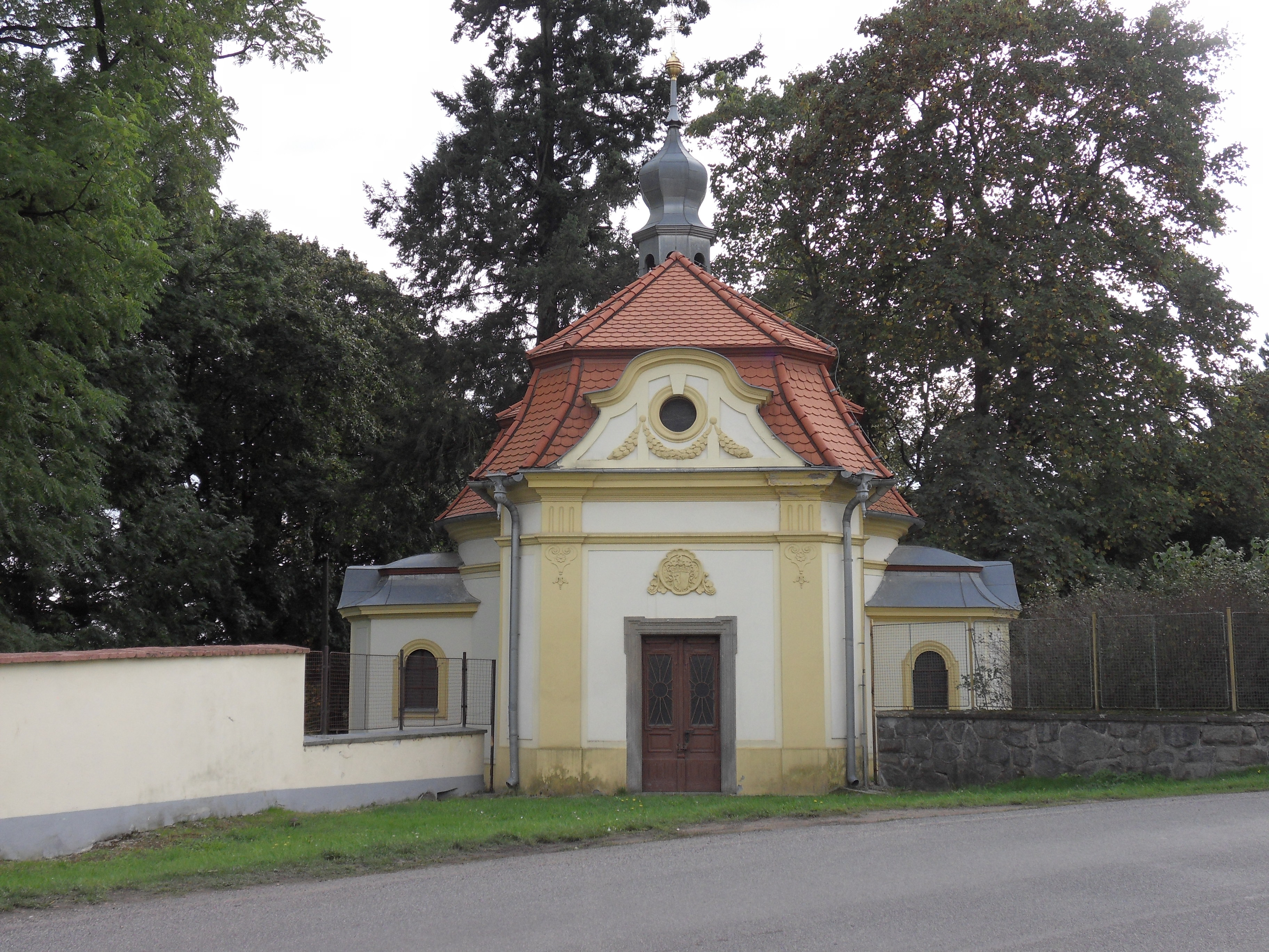 Kaple sv. Jana Nepomuckého, Vlkýš, Heřmanova Huť, okres Plzeň-sever